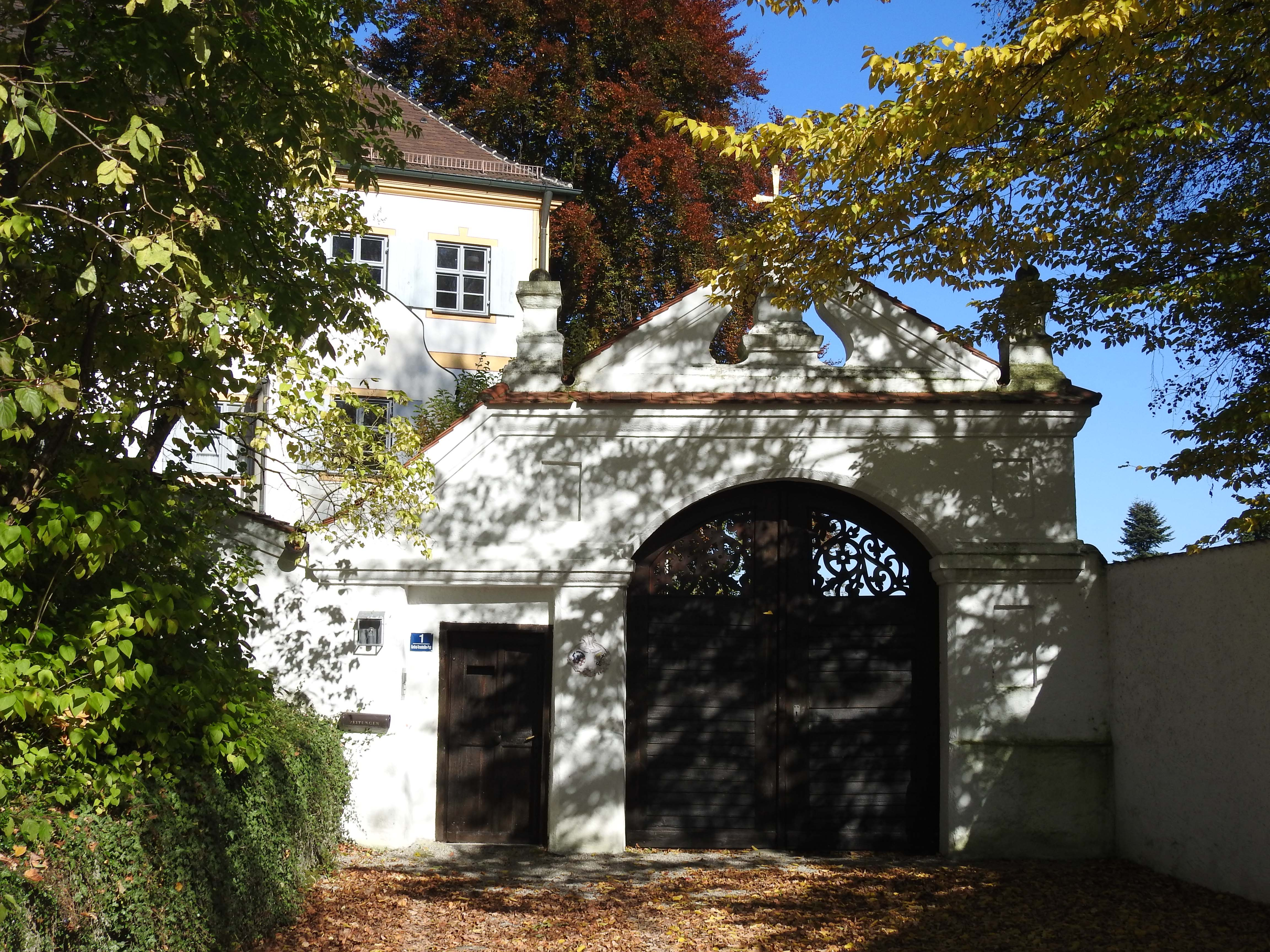 Pfarrhof in Walleshausen, Geltendorf